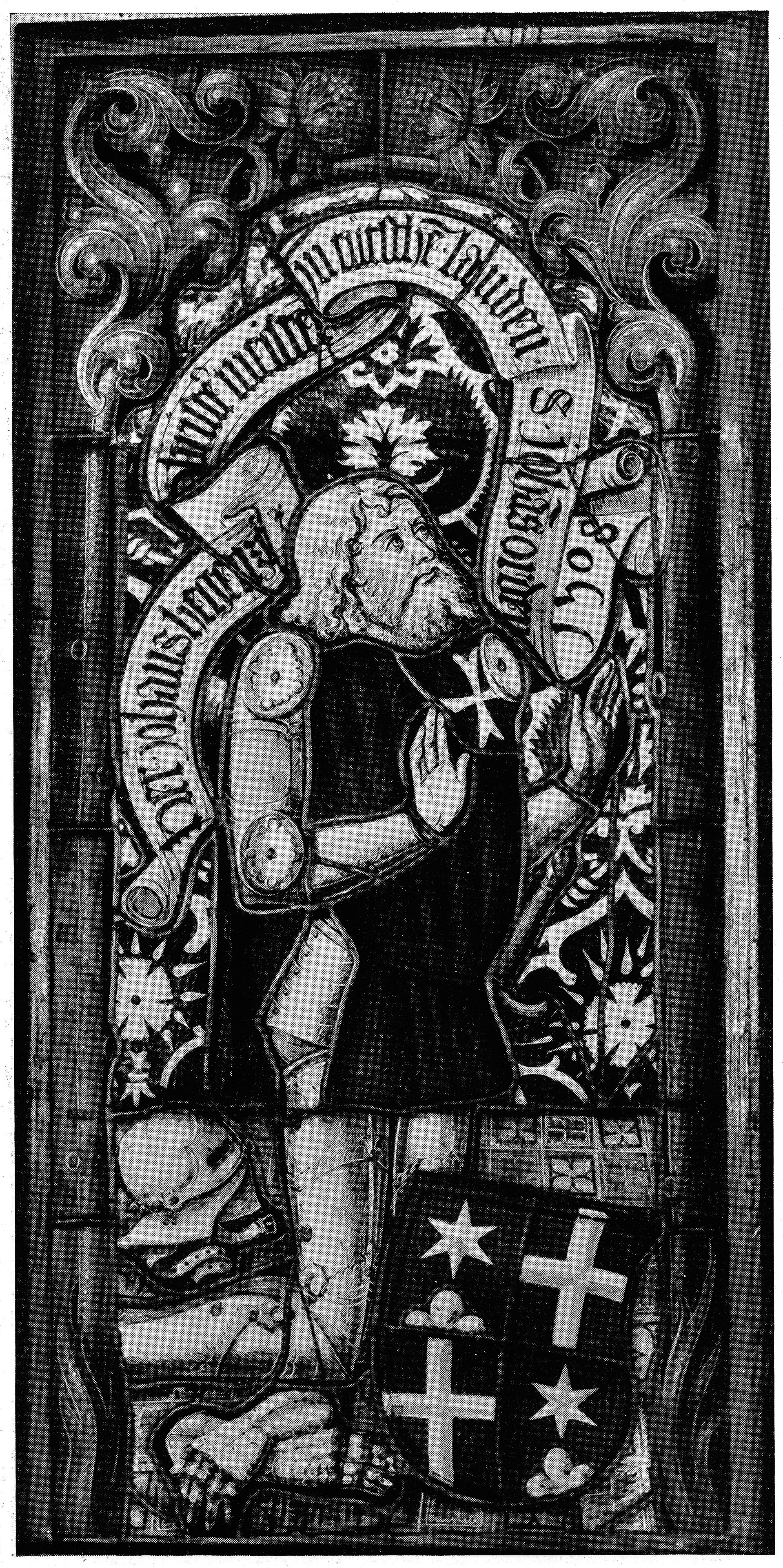 Glasgmäld (72,2 cm × 29 cm) aus der reformirten Kirch zů Wald im Zürichbiet, darauf abgebildet ein auf Knien betender Ritter des Johanniterordens; aufbewahrt im Schweizeriſchen Landes-Muſeo zů Zürich. Innſchrifft auf dem Spruchbande: Her・johans hegenzi・obriſtȇ meiſter jn tütſchẽ・landen・S・johãs orden 1508